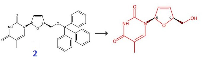 Le triphénylméthyle est le groupement composé des trois cycles aromatiques. Ce groupement va être retiré afin de créer la fonction alcool de la stavudine.